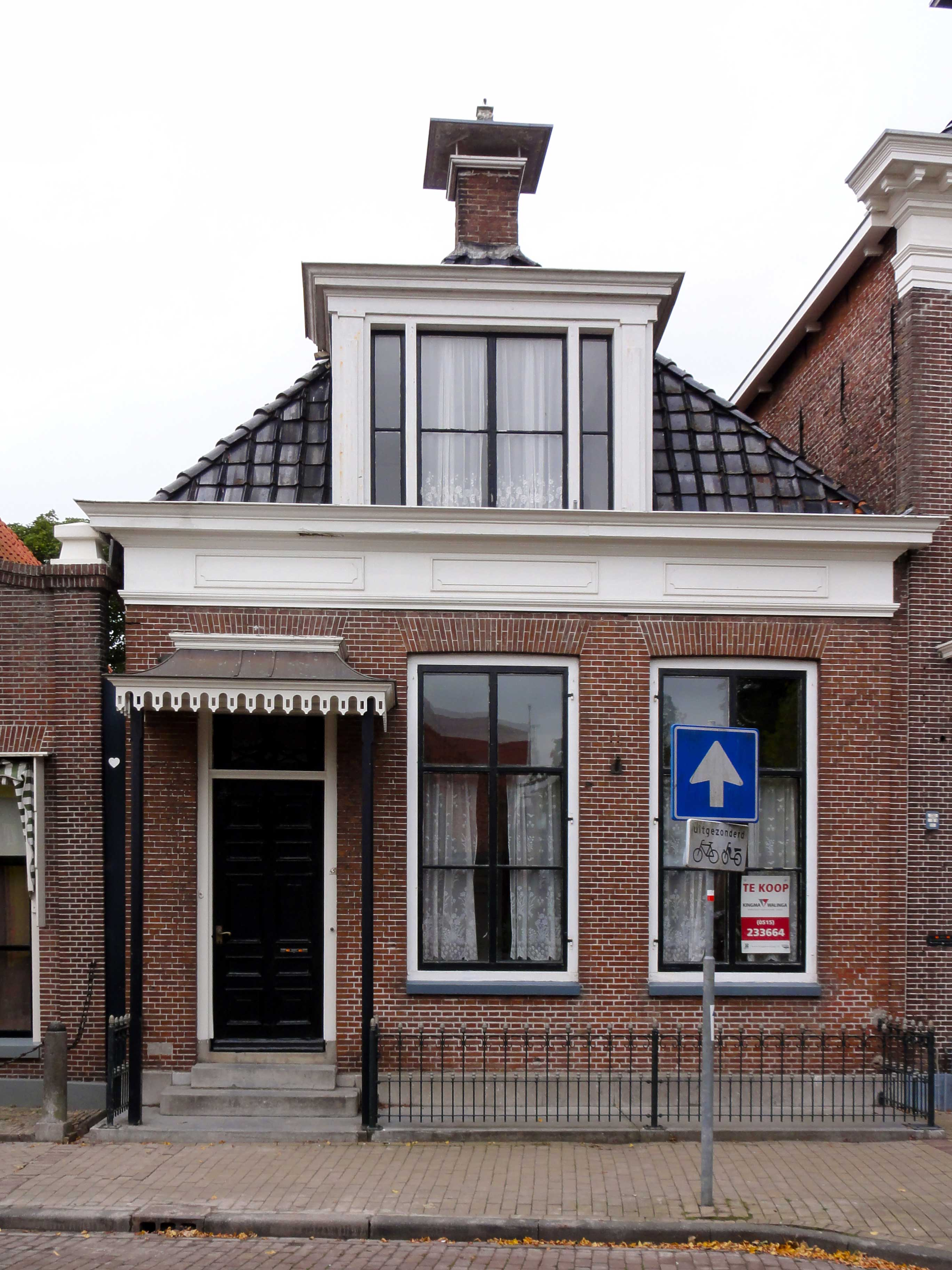 Kerkstraat 45 te Makkum